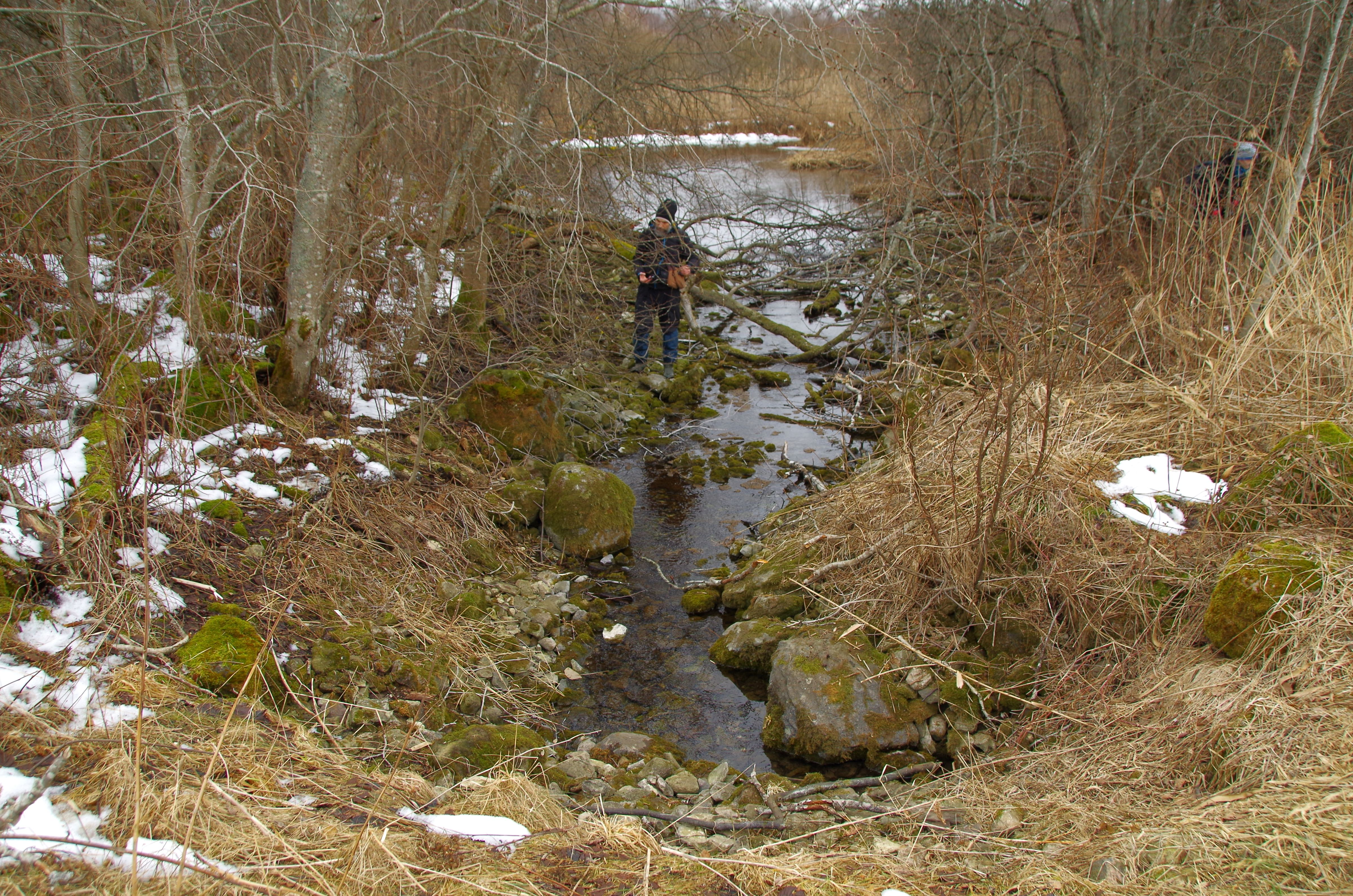 Lümandu ohvriallikas on allikas Rapla maakonnas Märjamaa vallas Kasari jõe vasakul kaldal.